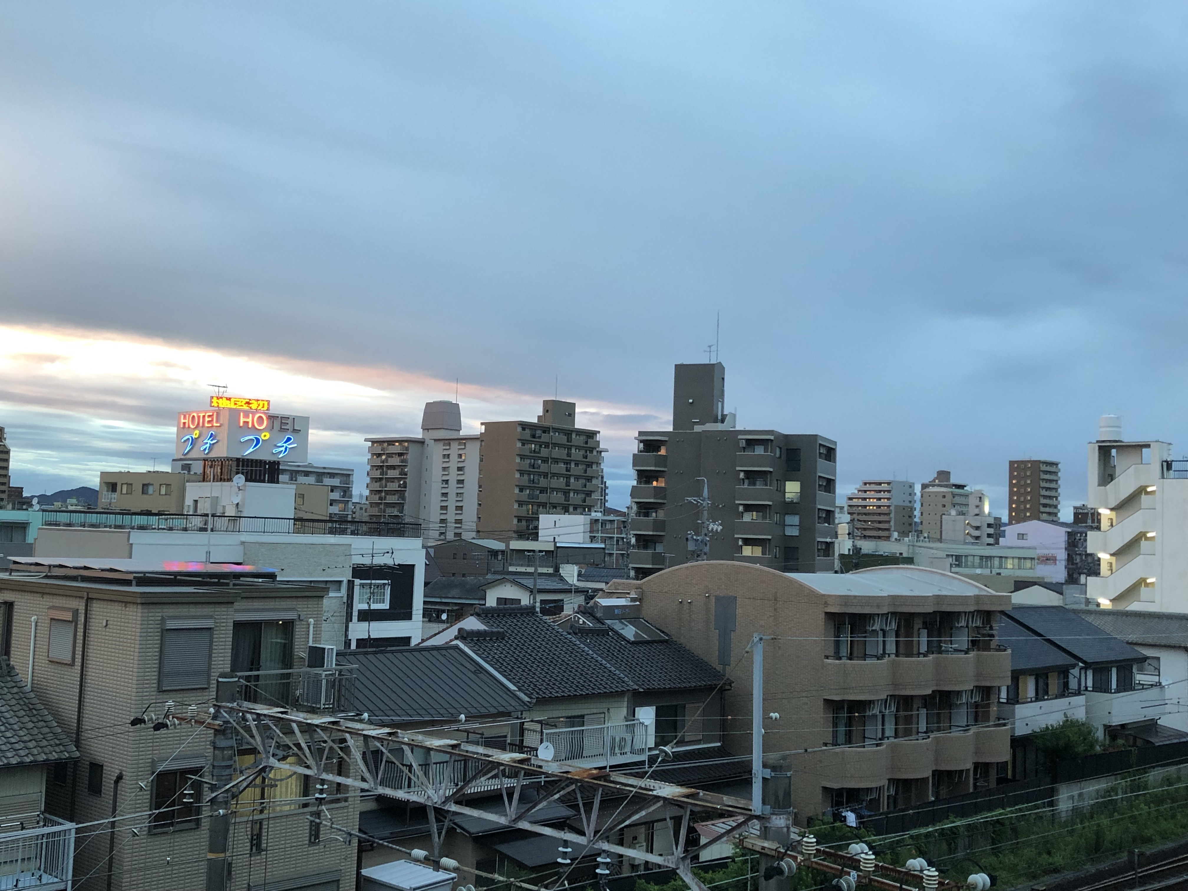 JR春日井駅周辺のビル群